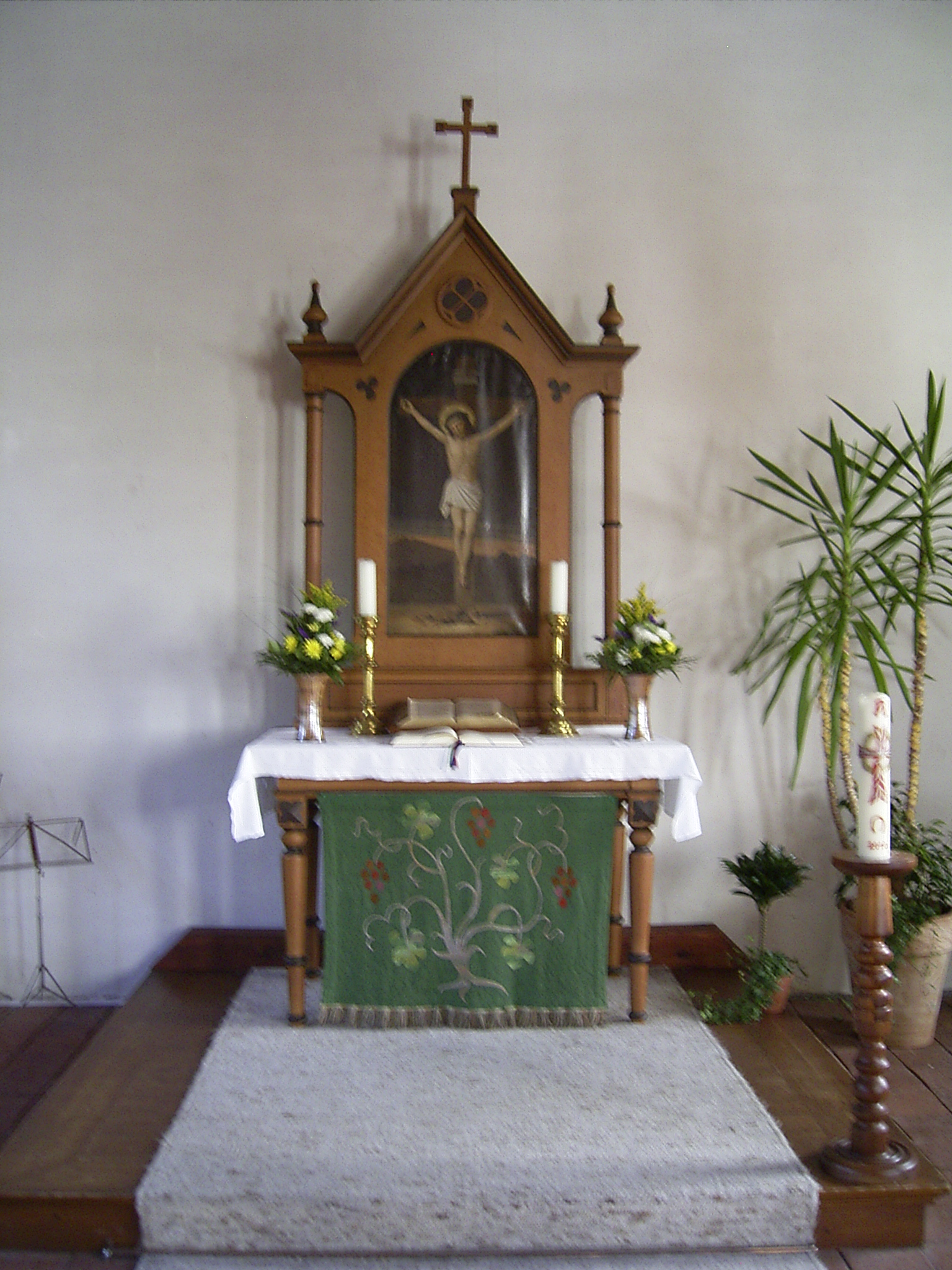 Altar der Kirche in Berumerfehn, Ostfriesland, Niedersachsen, Deutschland